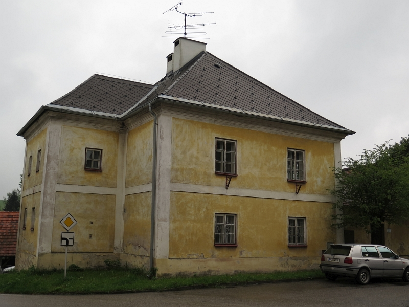 Fara, Farní 12, Benešov nad Černou.